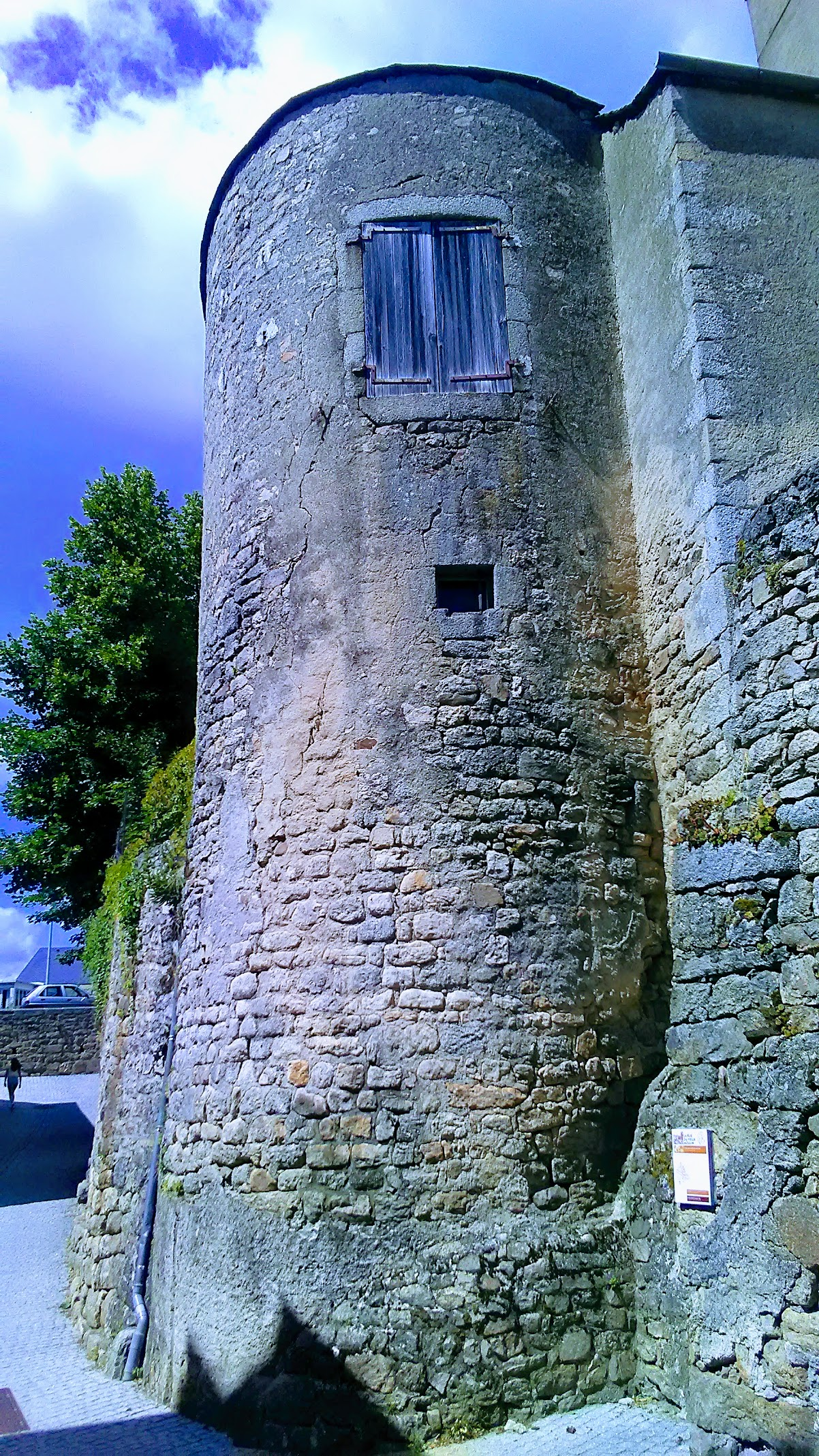 Remparts de Saint-Chély-d'Apcher au sud-ouest de la ville.